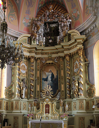 Пінск. Францысканскі касцёл. Галоўны алтар